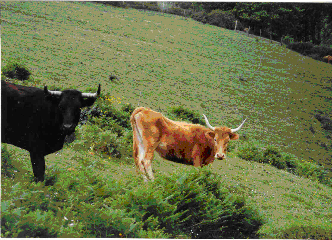 Lasturko zezen beltza eta betizua